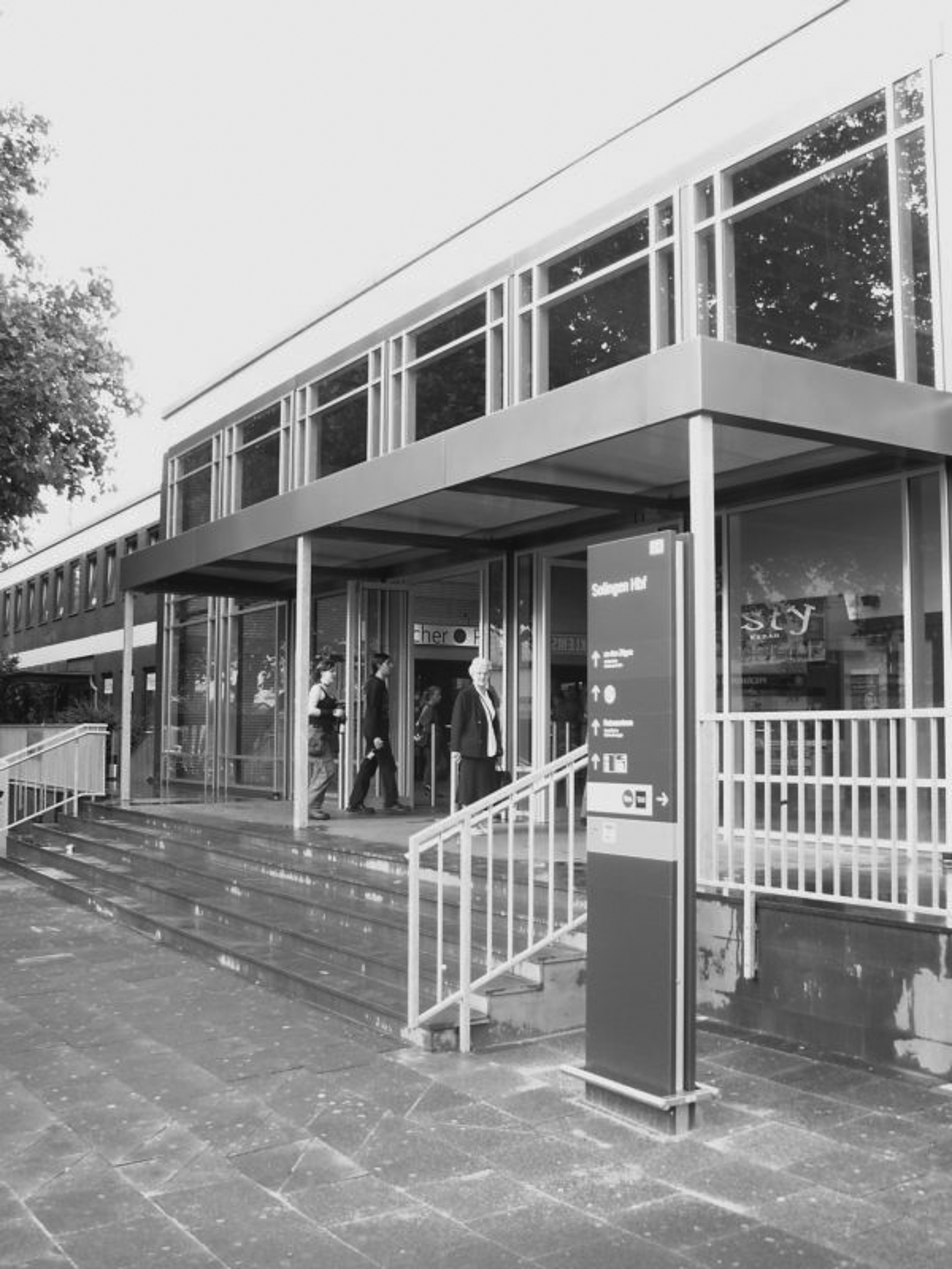 Solingen (Ohligs) Hbf